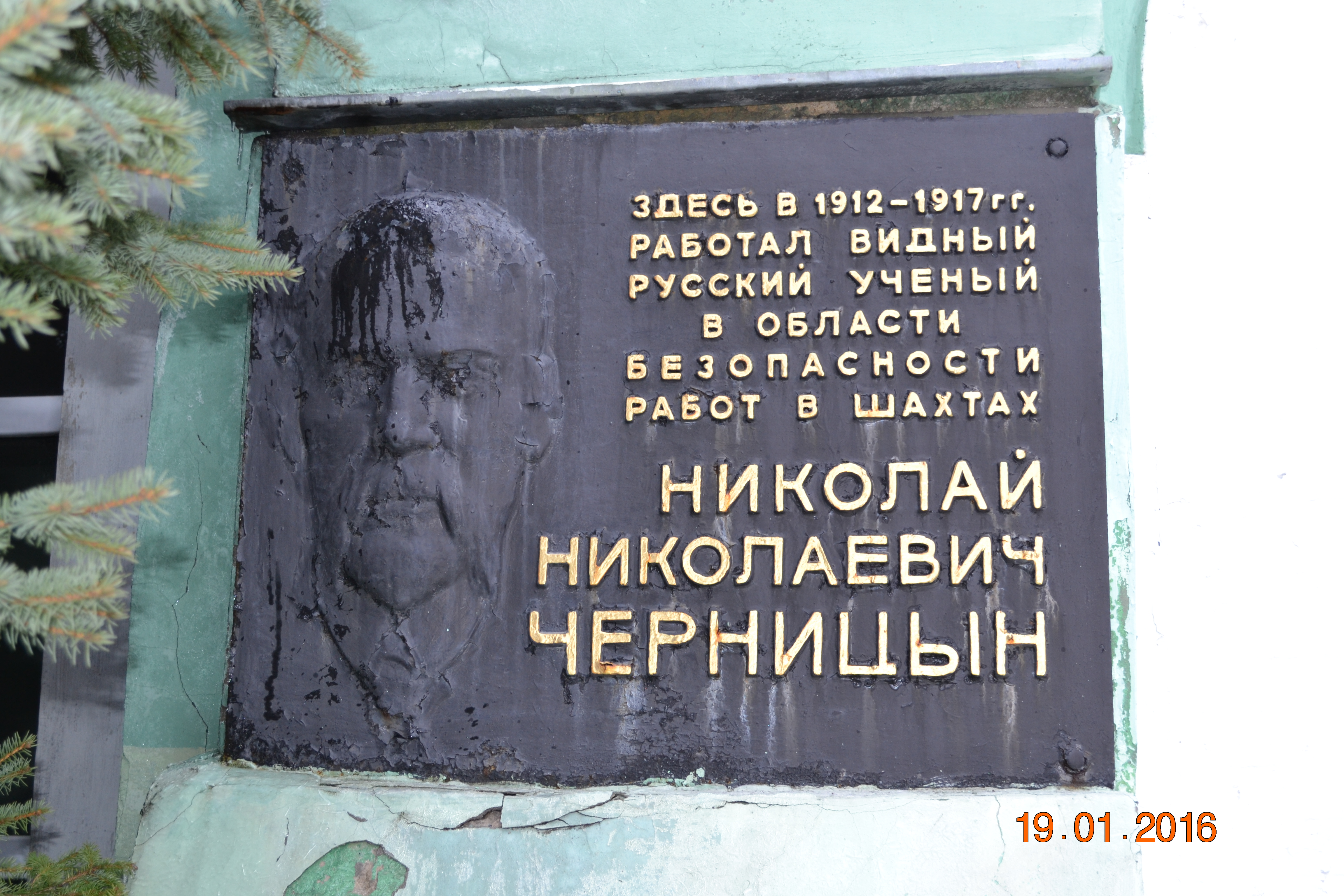 Мемориальная доска Н. Н. Черницыну на сохранившемся здании Центральной спасательной станции в МакНИИ